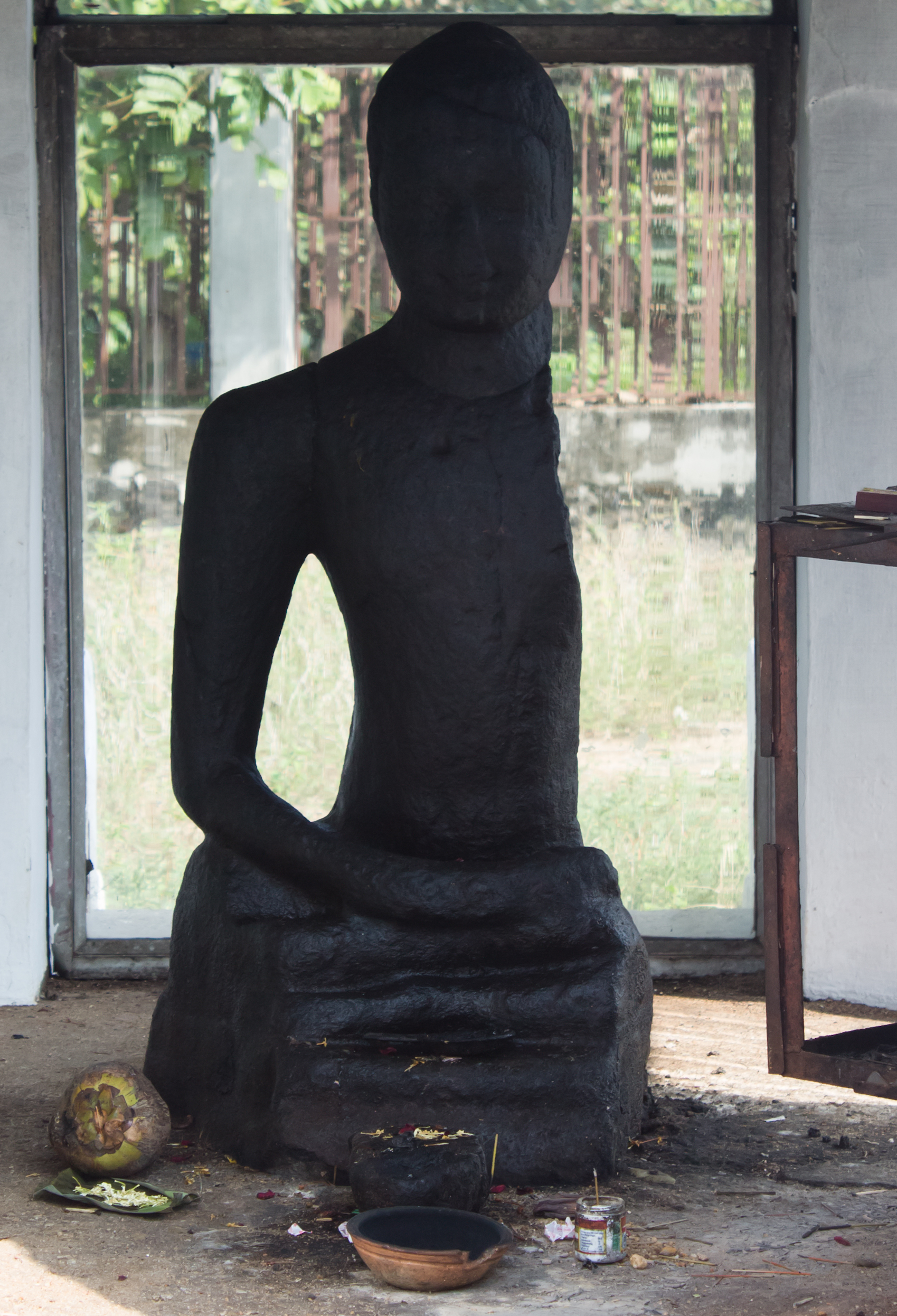 കരുമാടിക്കുട്ടൻ പ്രതിമ മുൻവശം